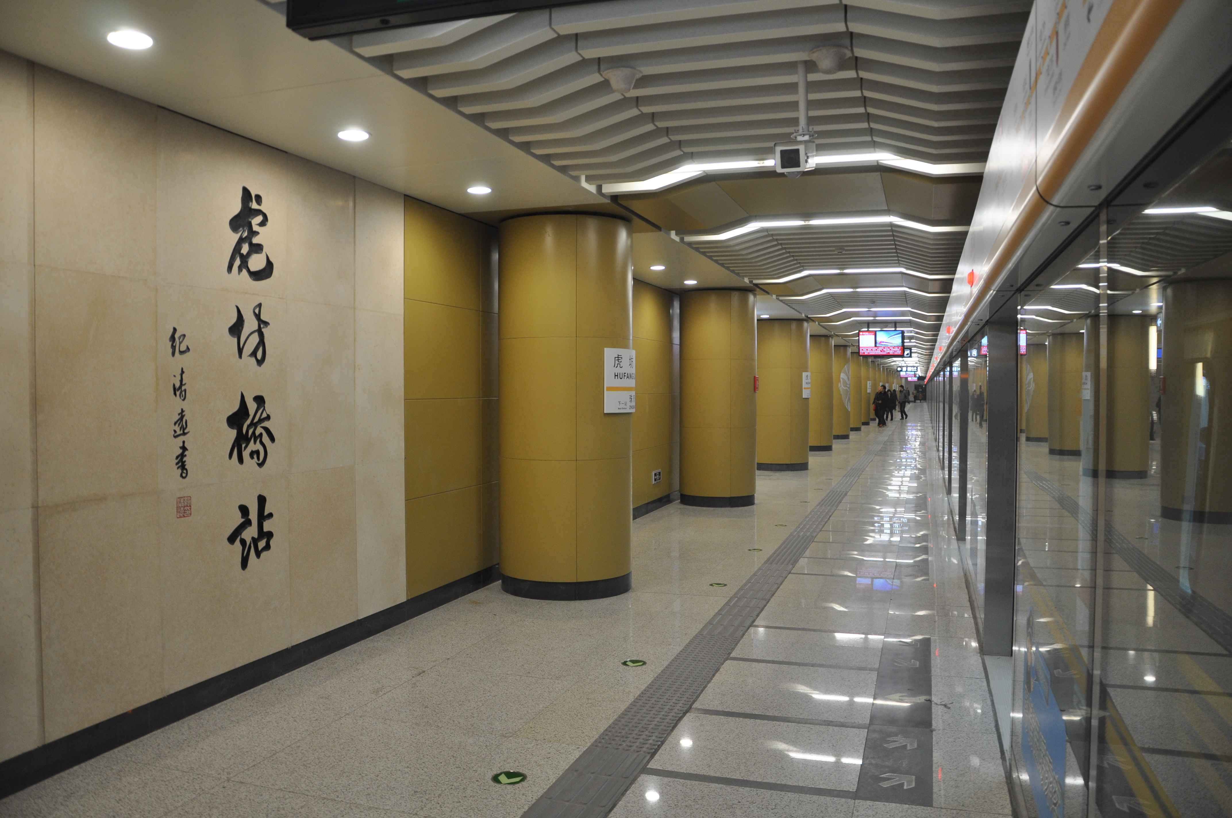 北京地铁7号线虎坊桥站站台